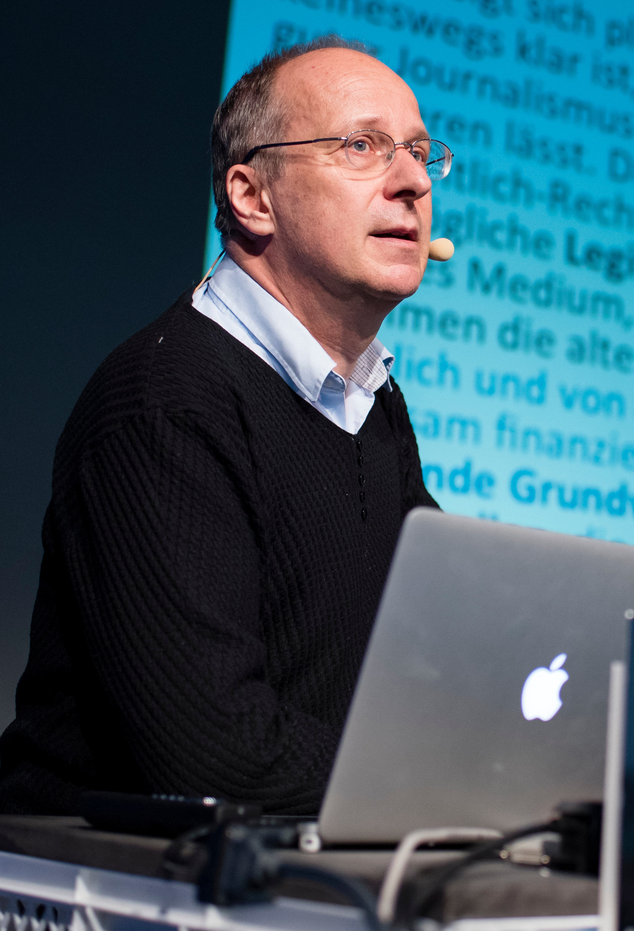 Lorenz Lorenz-Meyer mit „Prinzip Universalität: Warum wir die Zwangsgebühr verteidigen sollten“ am 04.05.2016 auf der re:publica in Berlin. Foto: re:publica/Gregor Fischer CC BY 2.0